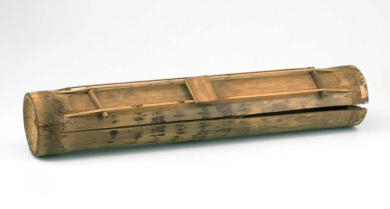 Tokkelinstrument. Buisciter van bamboe Unknown language: Tatabuang